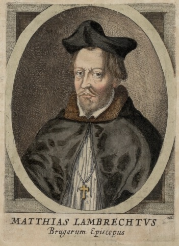 Bisschop Mathias Lambrecht - Afbeelding uit Flandria Illustrata (1641)